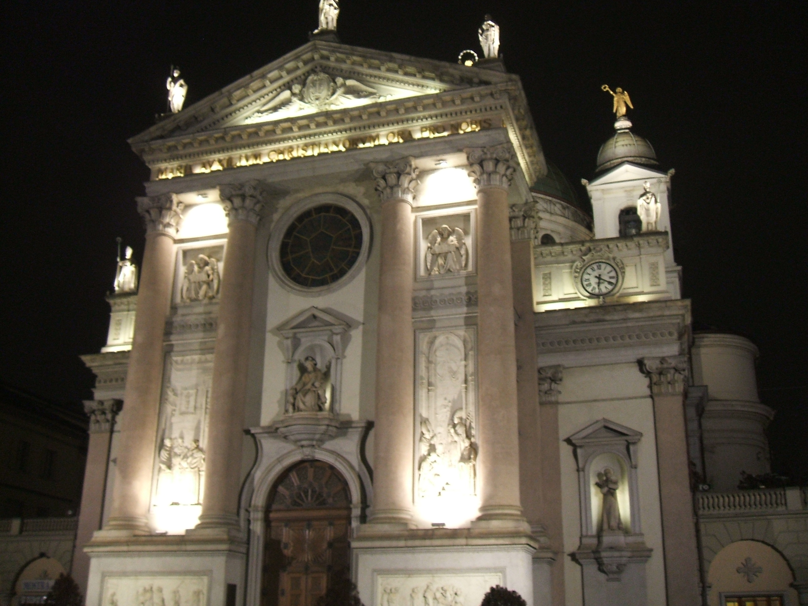 Basilica di Maria Ausiliatrice, Valdocco (Torino)